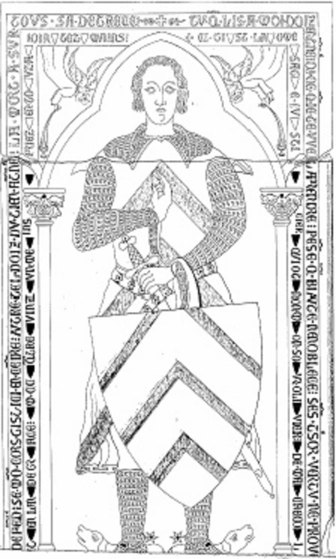 Dessin de la tombe d'Olivier de Machecoul, aux Sorinières